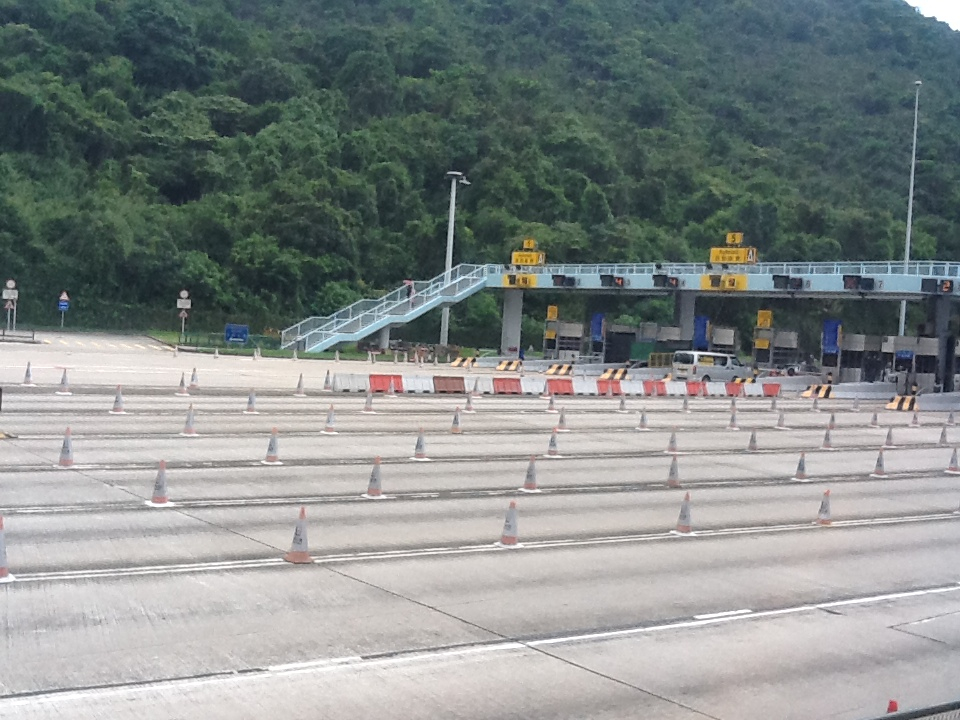 粵語: 大老山隧道收費處